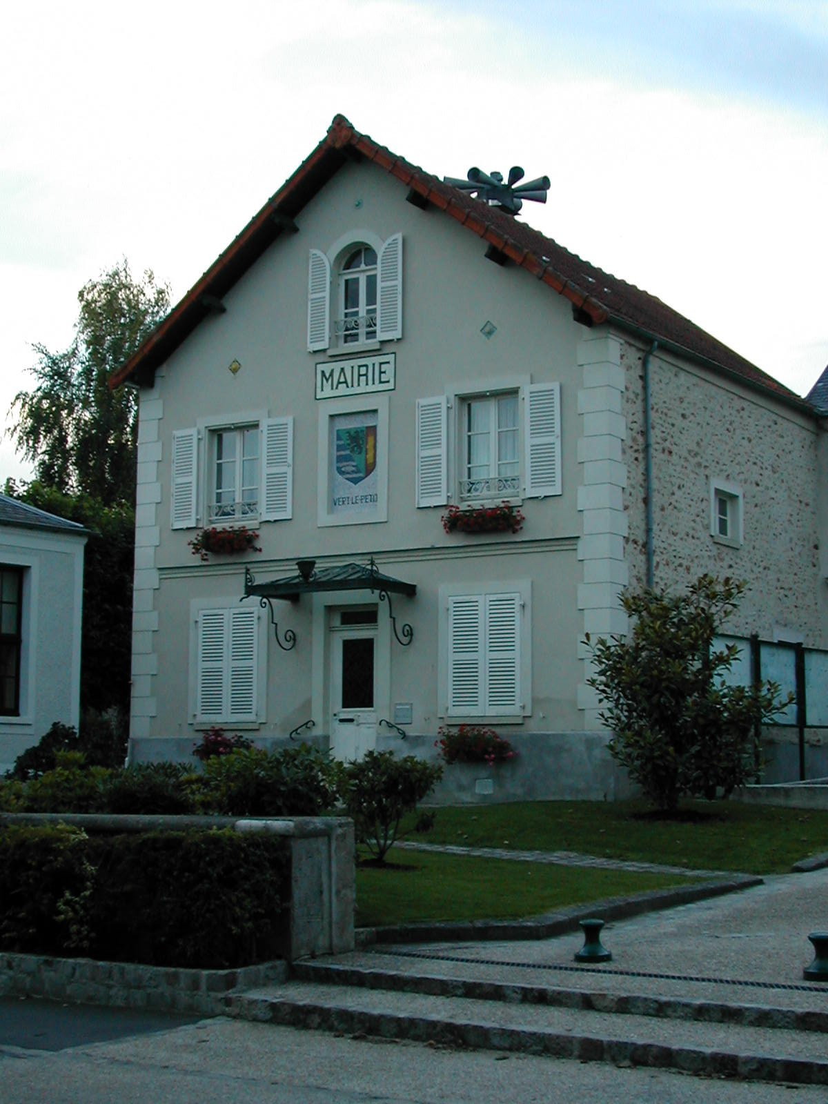 Photo de la Mairie de Vert le Petit